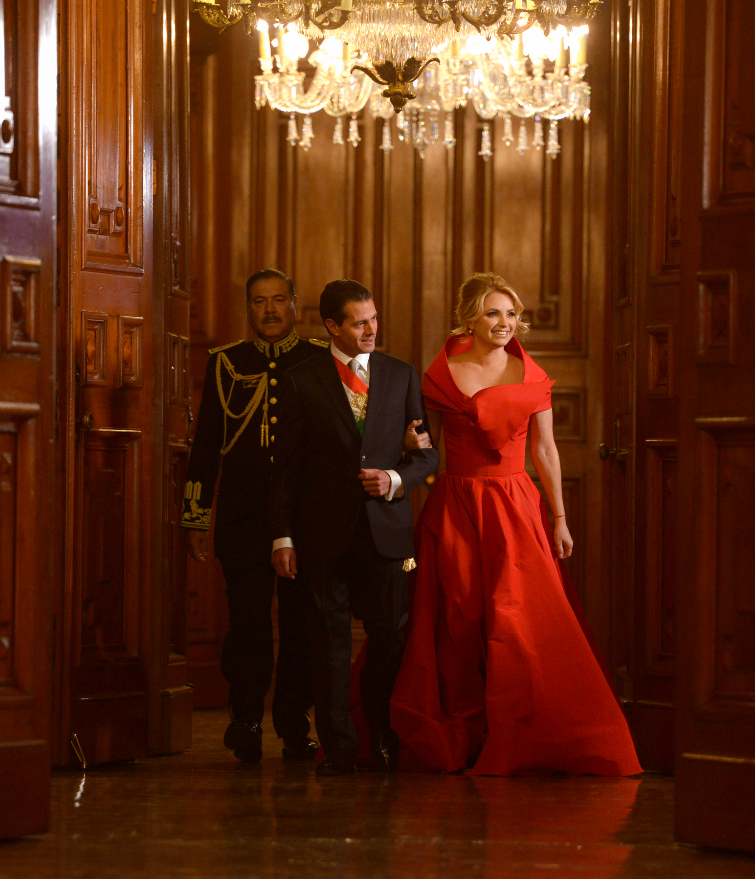 El Presidente Enrique Peña Nieto encabezó el 208 Aniversario del inicio de la Gesta Independentista, con la tradicional ceremonia del Grito.